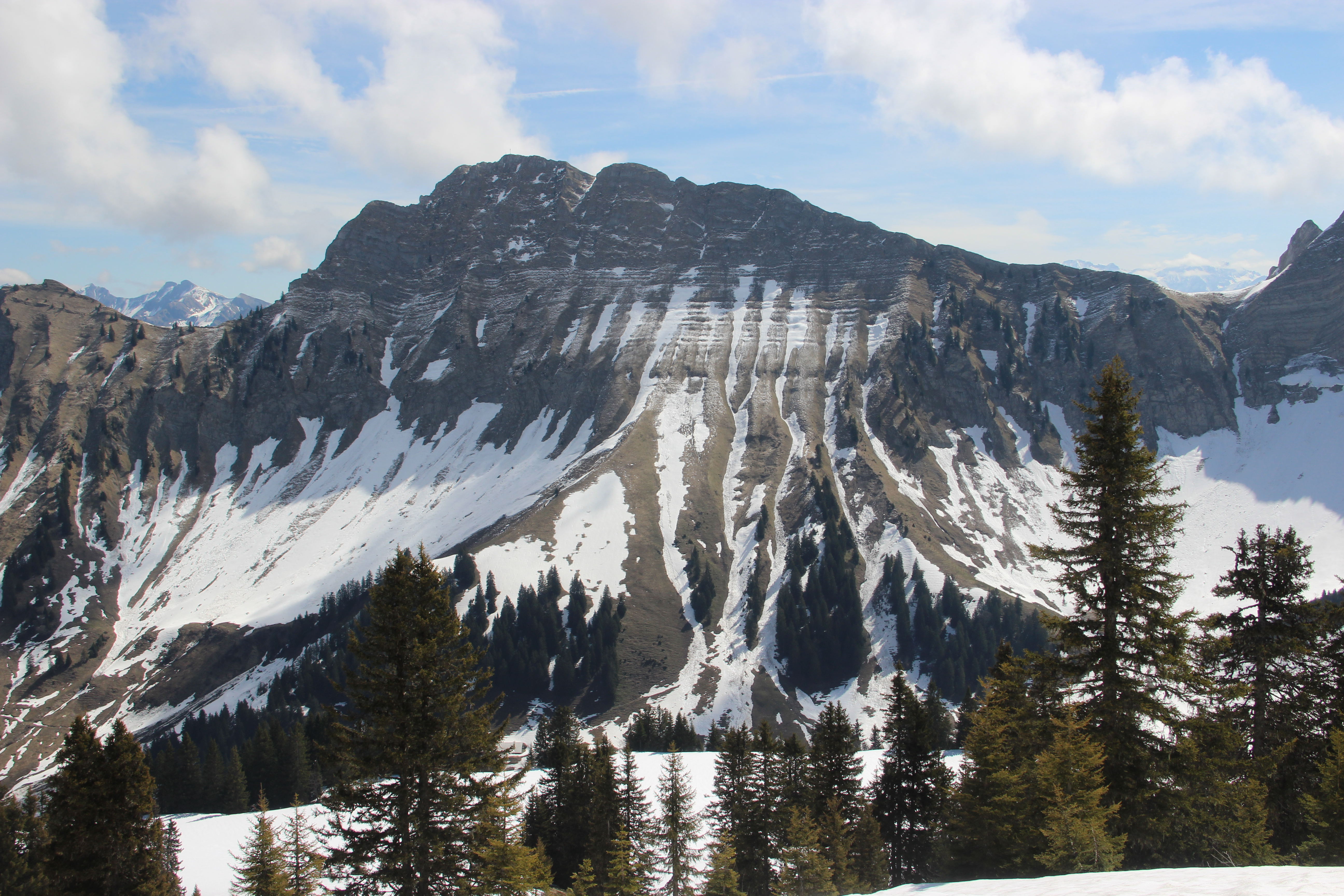 Vanil des Artses seen from Le Molard